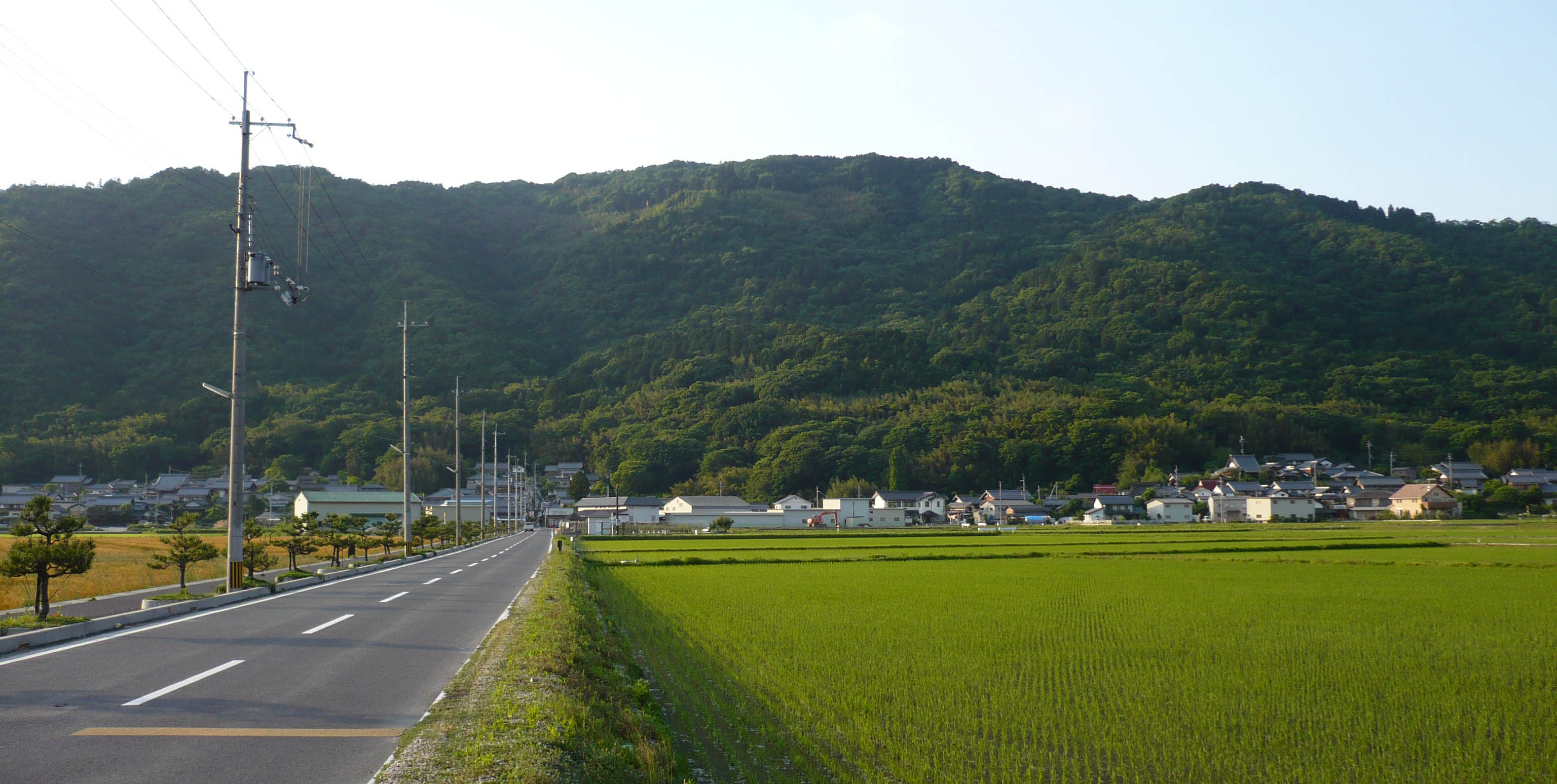 繖山